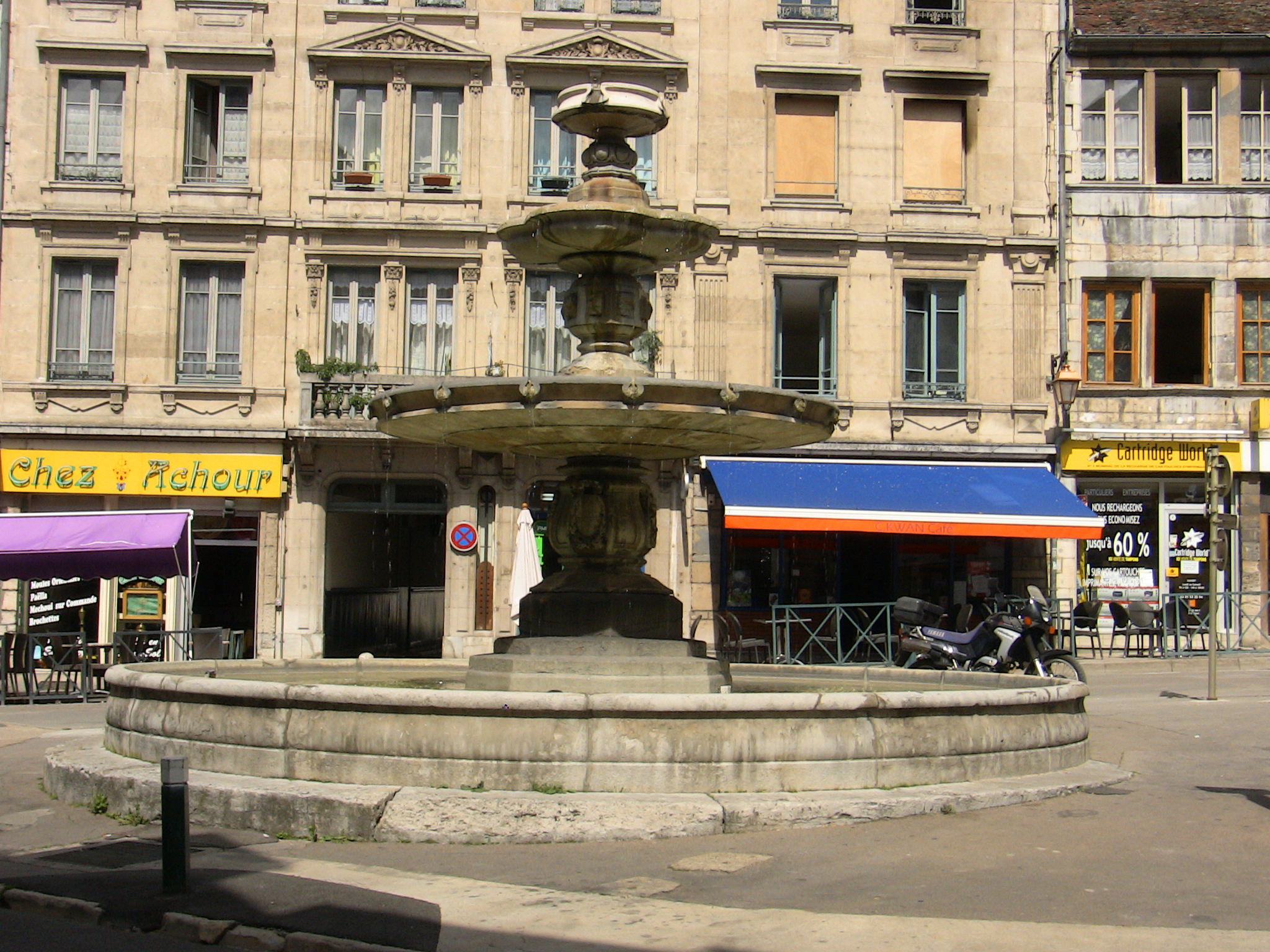 La fontaine place Bacchus de Besançon.